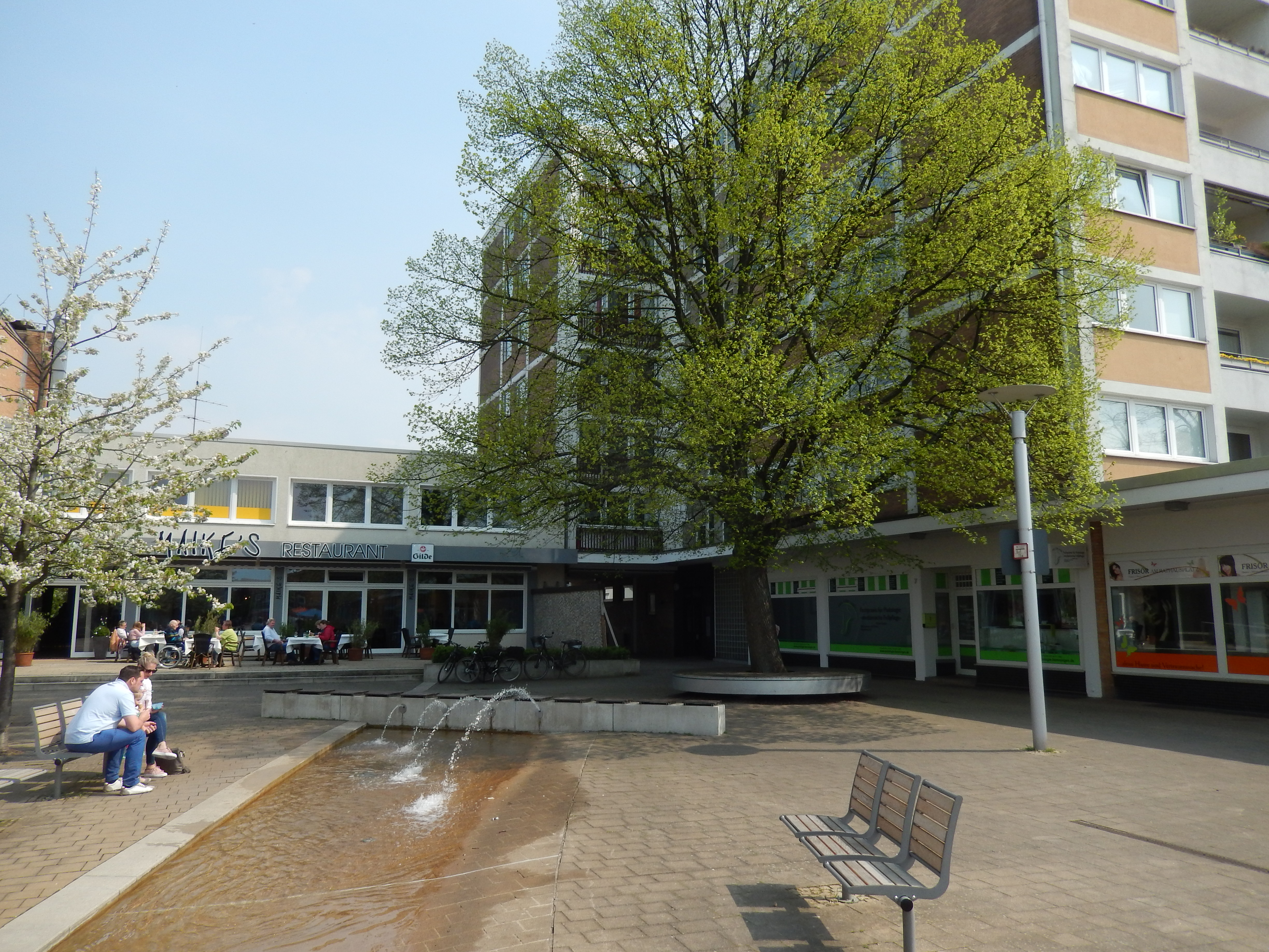 Brunnen auf dem Marktplatz Hemmingen